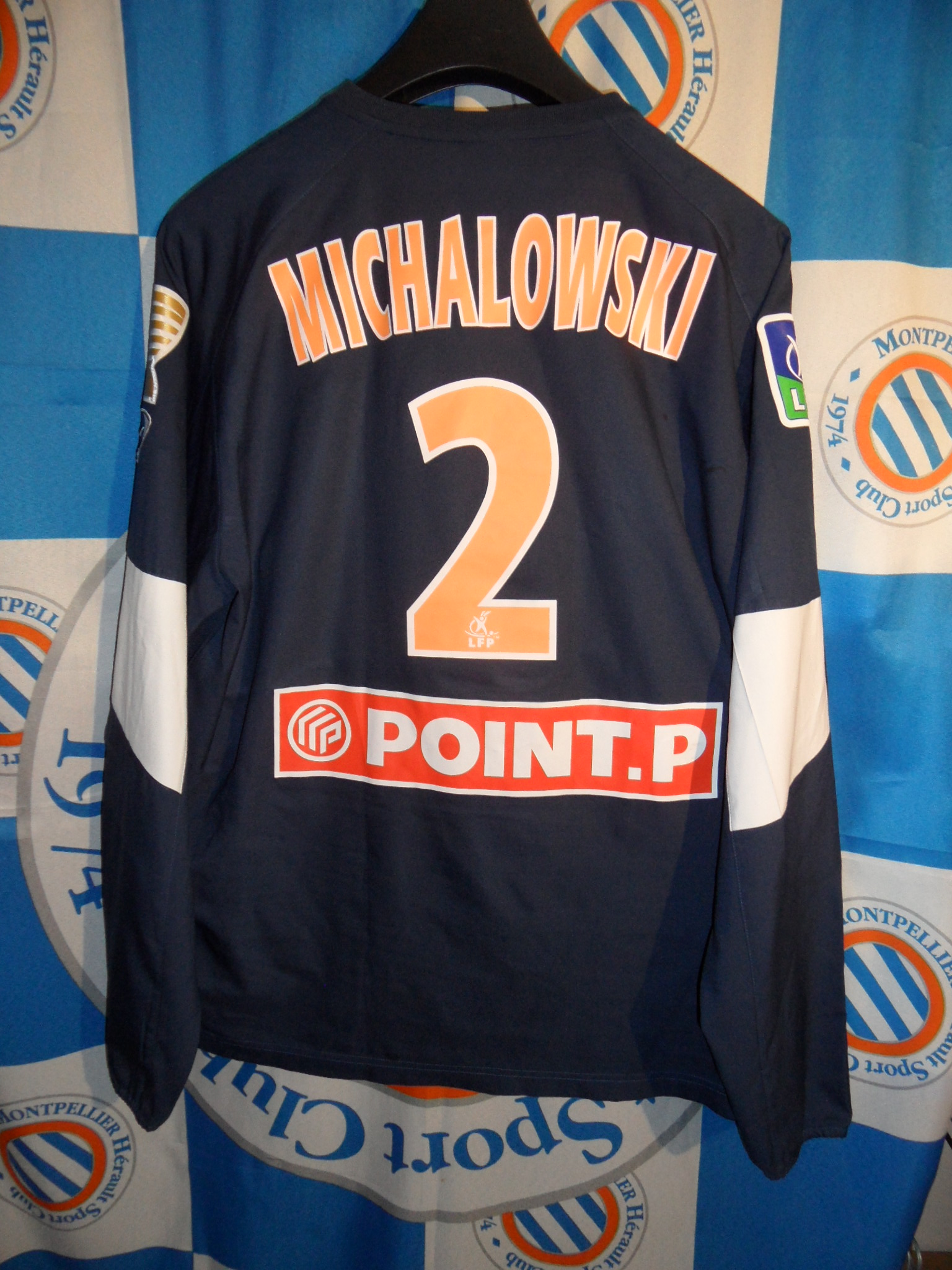 Maillot du Montpellier Hérault Sport Club, porté, lors d'un match de Coupe de la Ligue, par Sébastien Michalowski